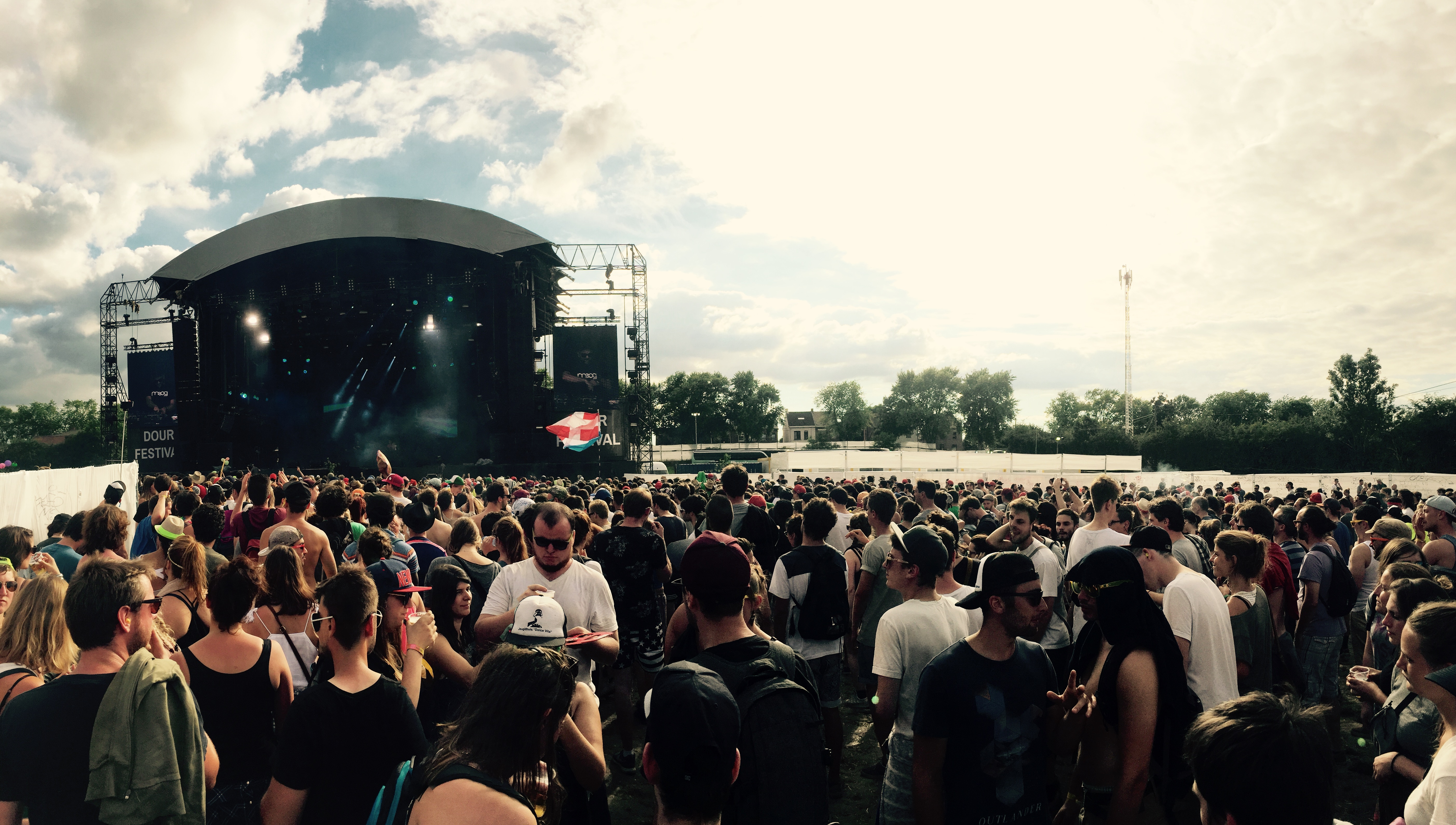 Dour festival 2016